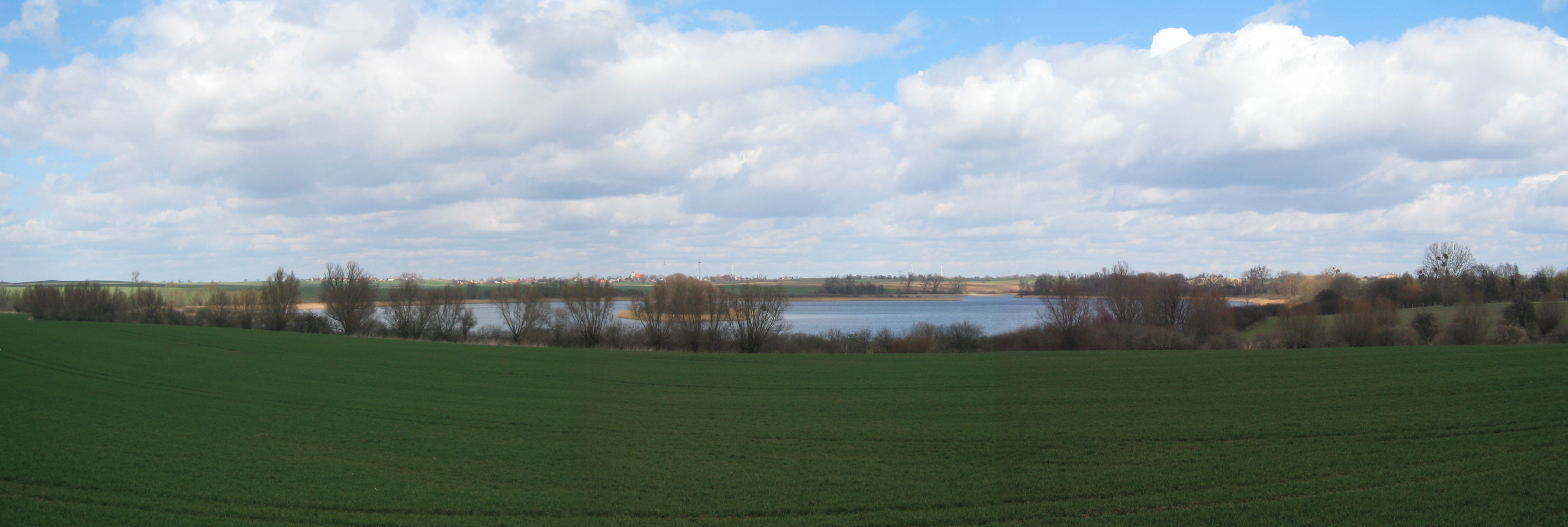 Blankenburger See